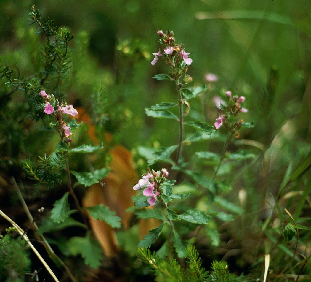 Edel-Gamander (Teucrium chamaedrys), Lippenblütler (Lamiaceae) - Österreich/Austria/Autriche: Tirol, Fernpass, Fernstein